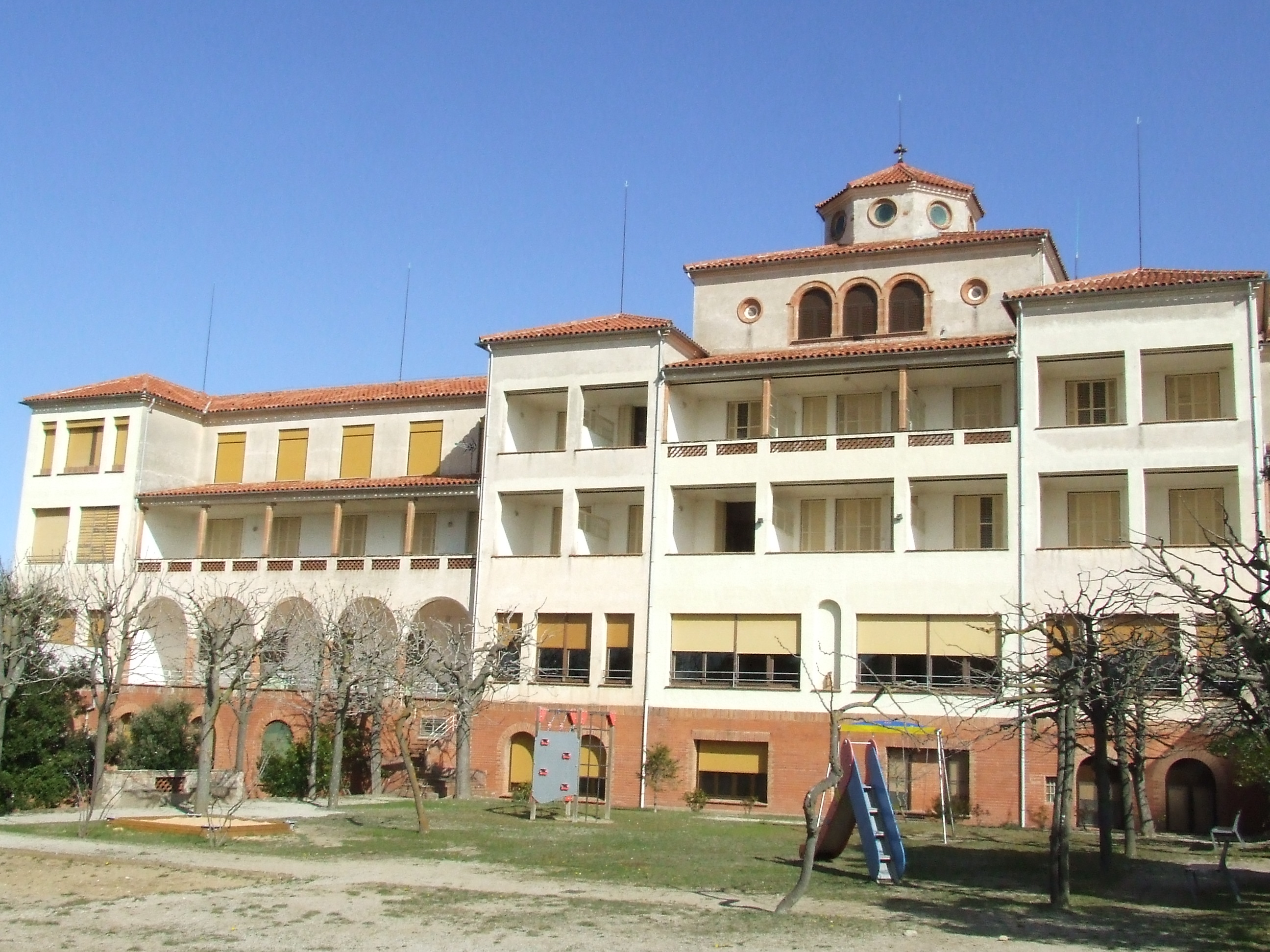 Puigdolena (Sant Quirze Safaja, Moianès)